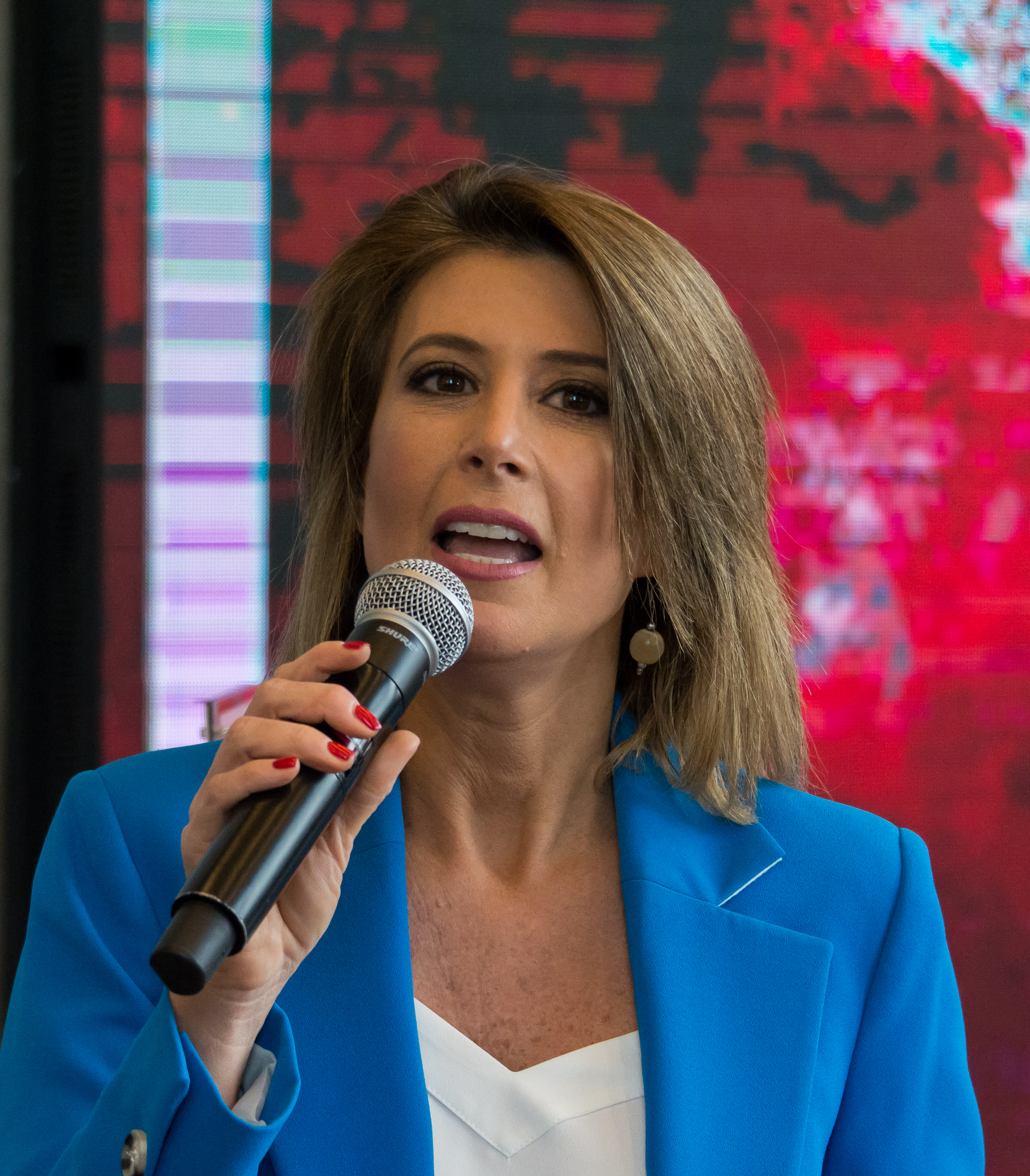 Macarena Pizarro, Despedida deportistas Panamericanos 2019, Oficinas de Kia, Las Condes, Santiago, Chile.